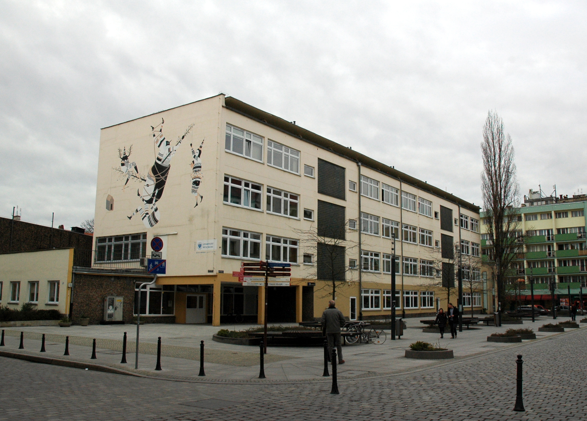 Wrocław w 2015 roku